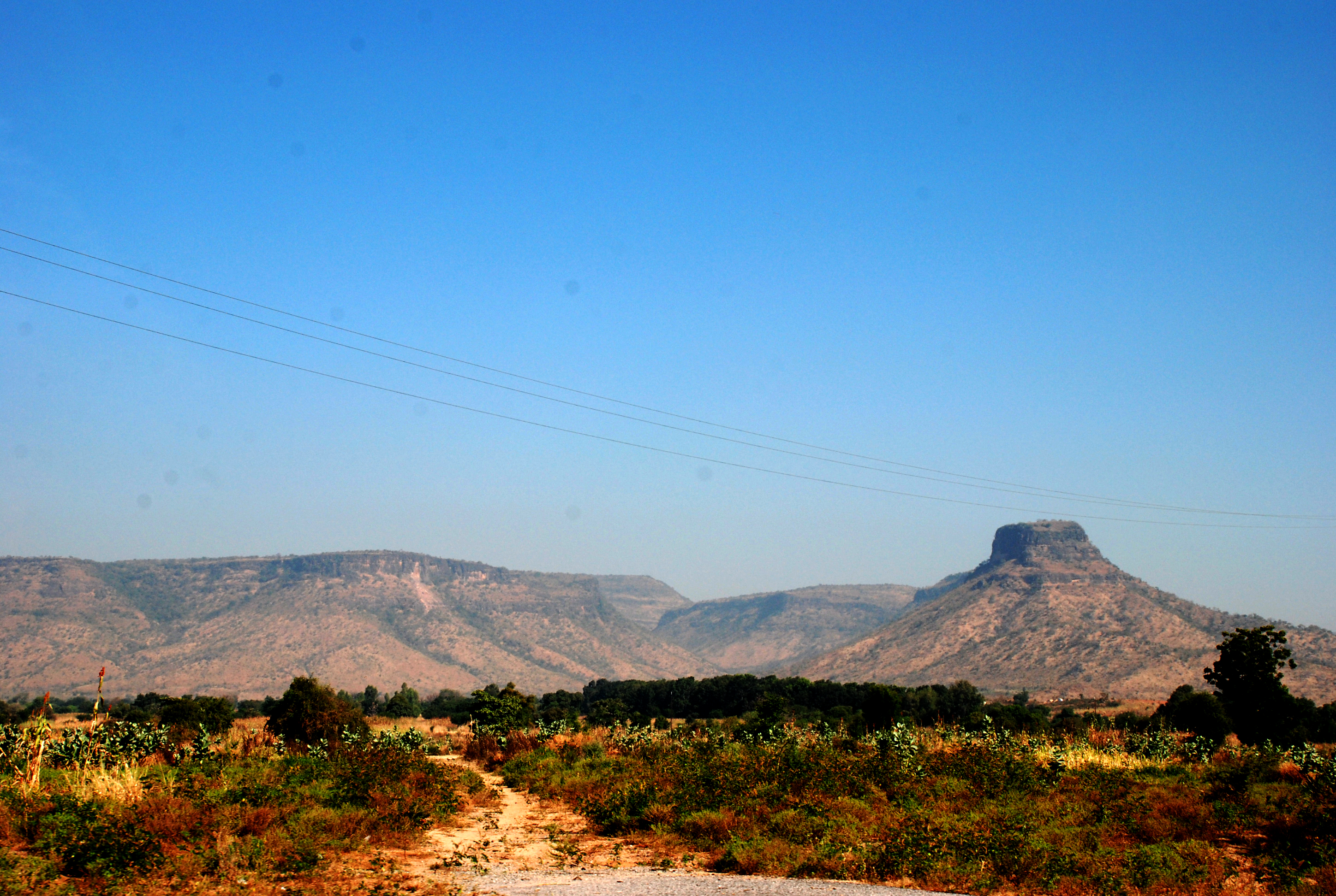 Montagne dans le nord du Cameroun